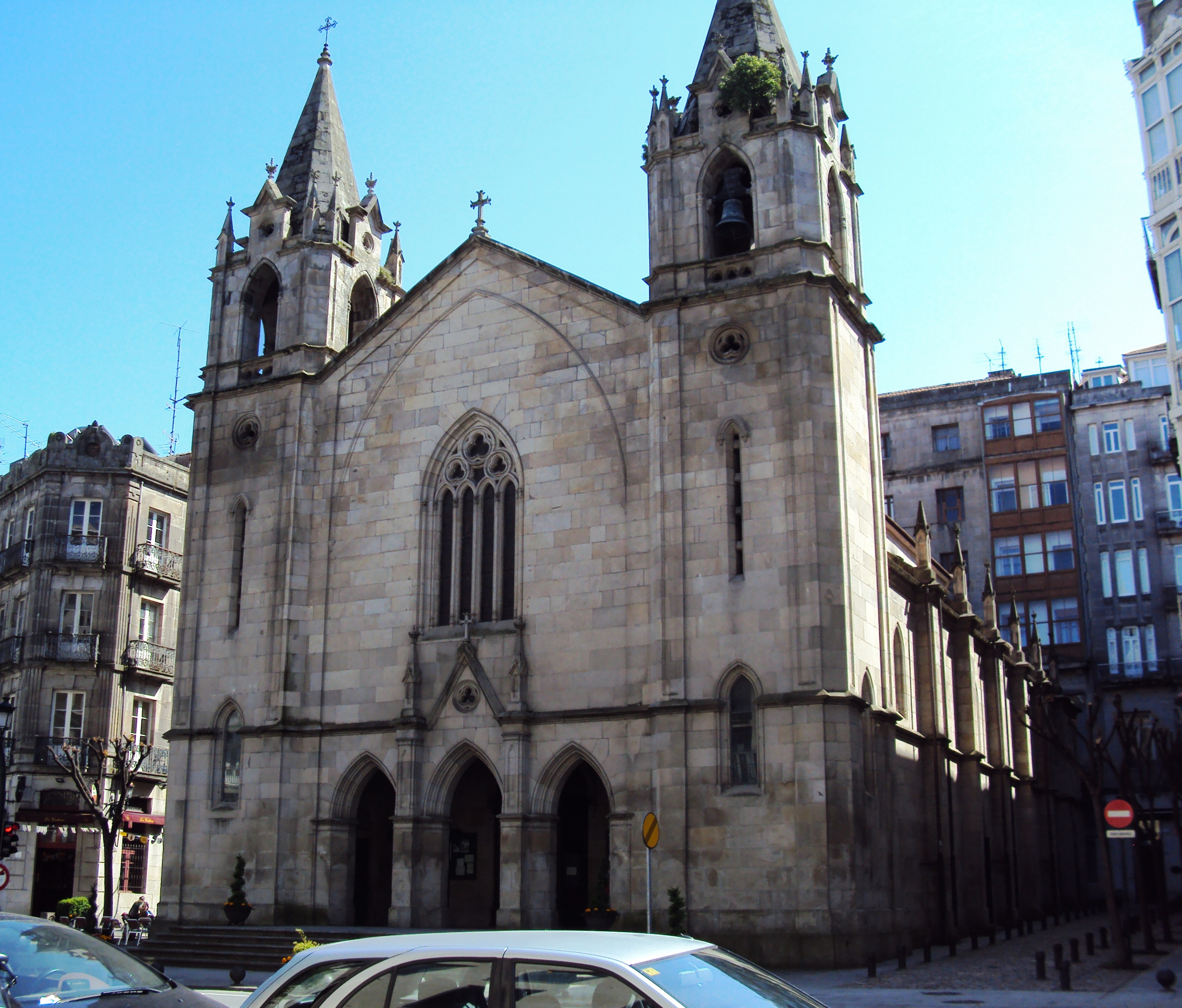 "Igrexa exenta con 4 fachadas que ocupa unha mazá enteira, coa finalidade de obter a máxima iluminación natural. Foi proxectada polo arquitecto Manuel Felipe Quintana e construída entre 1896-1907, polos contratistas Cerviño e Senra. O seu estilo é historicista neogótico, non obstante as súas formas non son esveltas e diáfanas, como é típico do neogótico, senón que ten aparencia pesada polas súas grandes superfices macizas. Ten planta rectangular con tres naves. As bóvedas son de crucería, con contrafortes laterais, rematados en pináculos neogóticos. A nave central é a maior e ilumínase mediante o grande ventanal da fachada principal, os tres vans alongados e estreitos da ábsida e os óculos trilobulados dos muros laterais." Turgalicia.